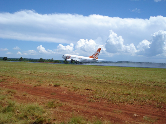 Aeroporto de Chapecó